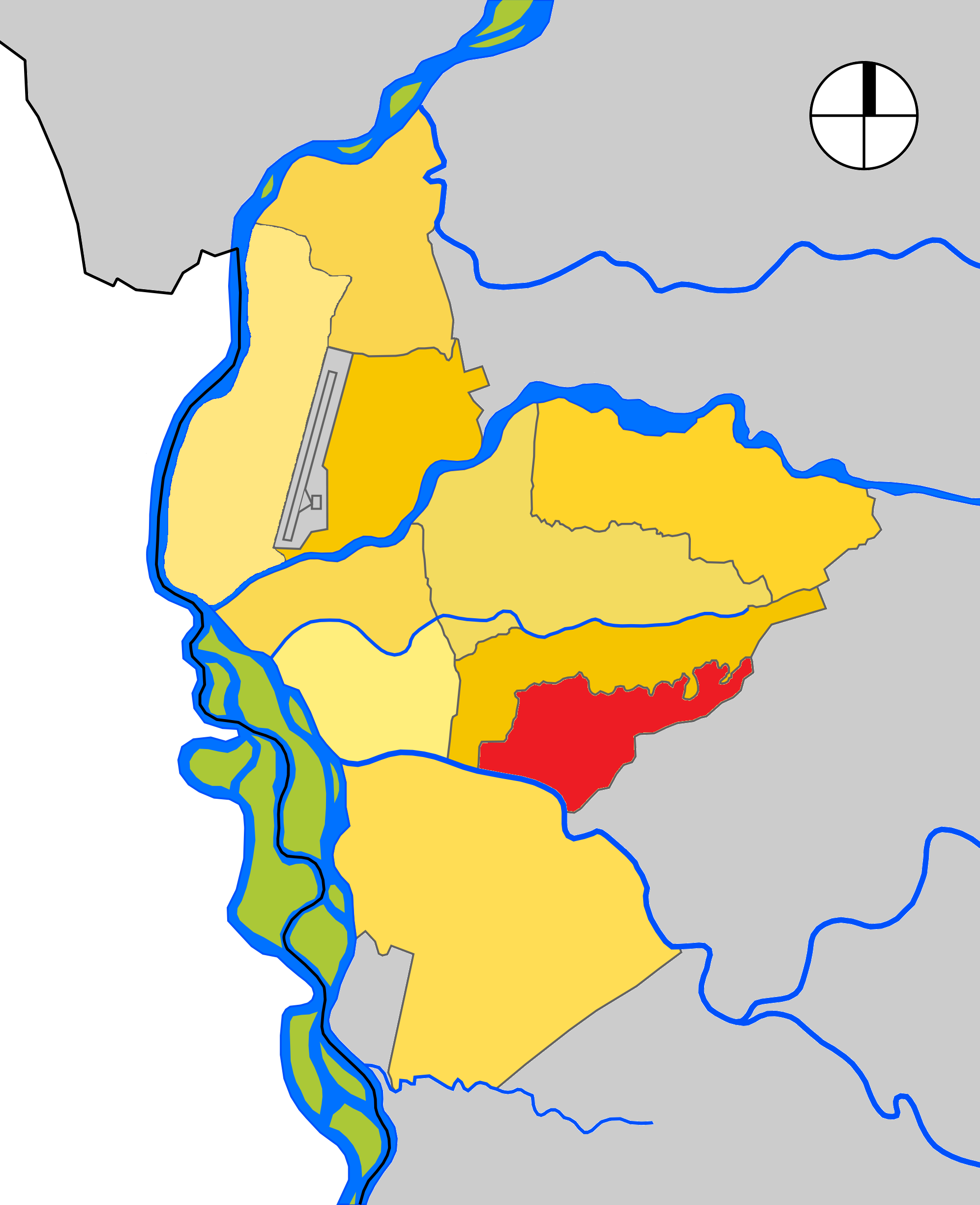 Mapa de las Comuna 8 de Neiva, departamento del Huila, Colombia.